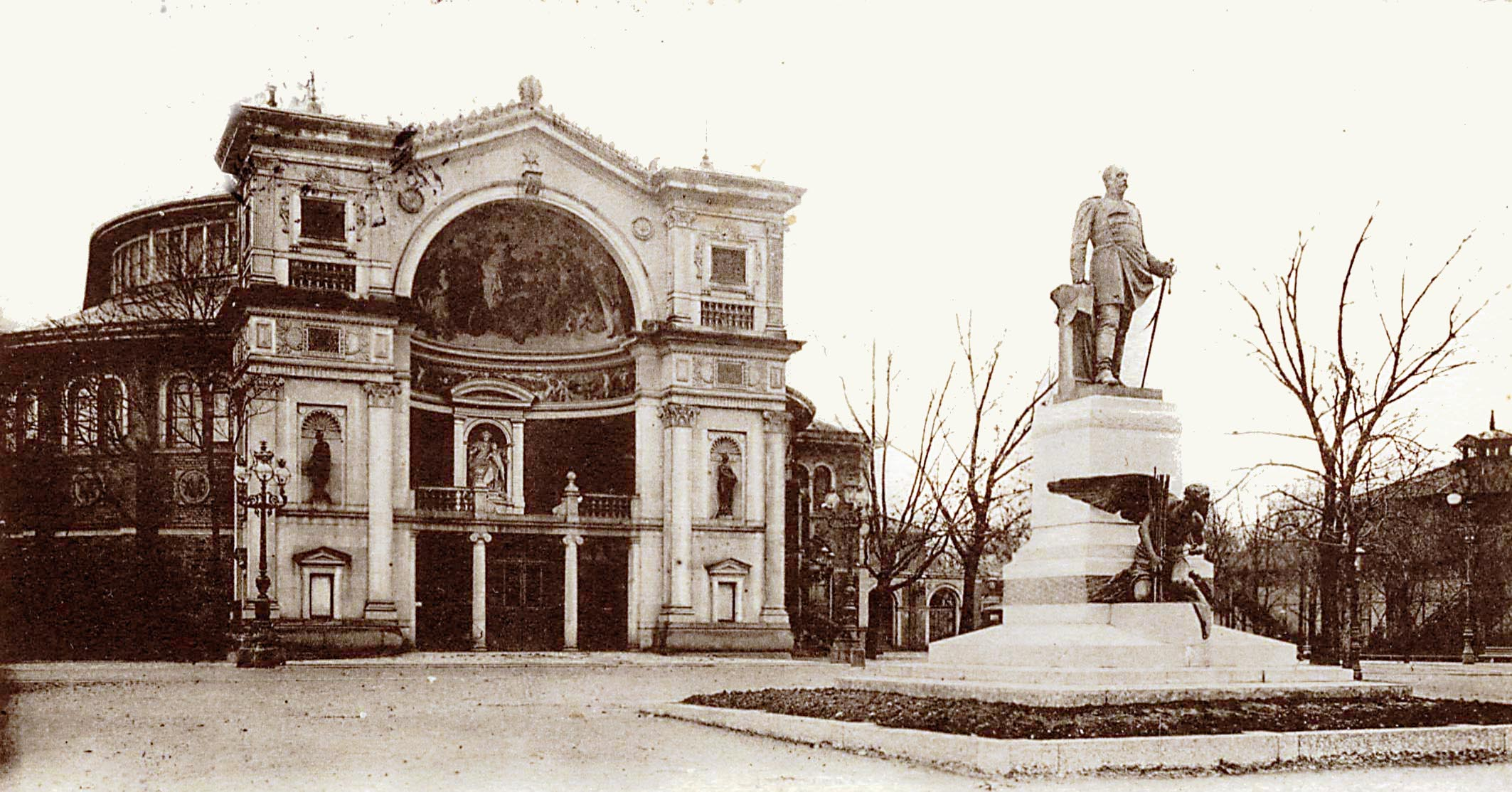 Alte Festhalle und Bismarck-Denkmal in Karlsruhe